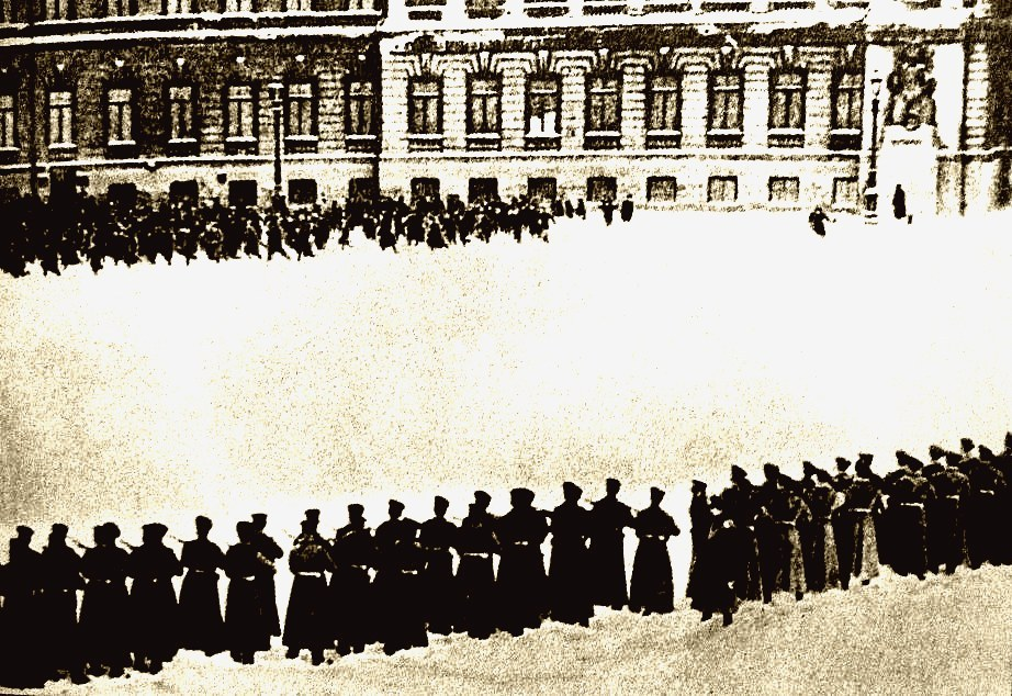 Расстрел рабочего шествия 9 января 1905 года. Фотография.